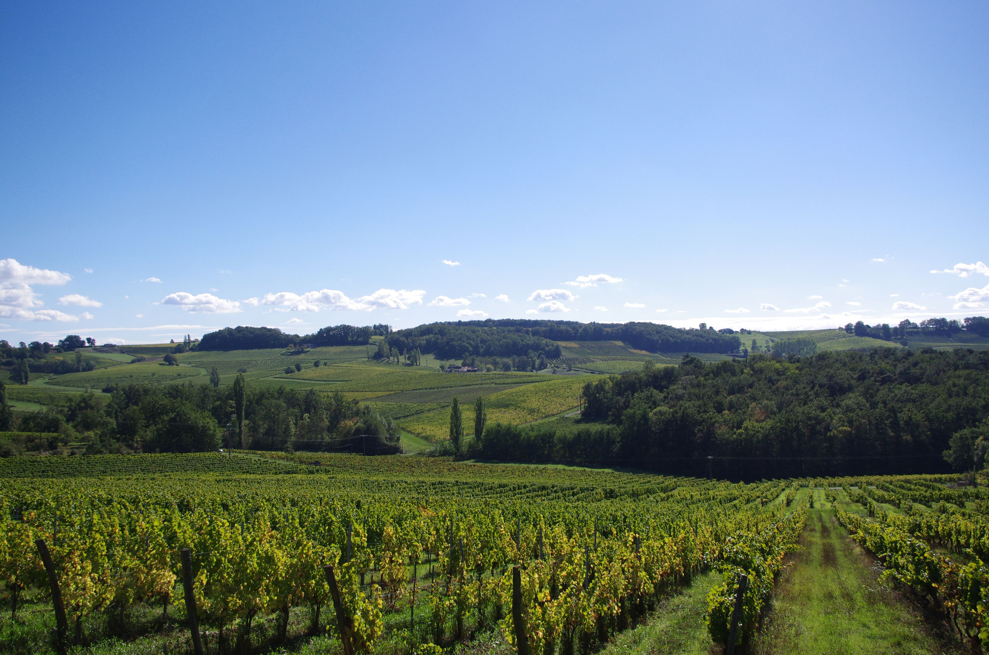 Vignoble de l'AOC Montravel